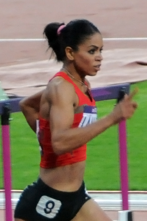 La marocaine Hayat Lambarki en demi-finale du 400m haies lors des JO de Londres 2012.